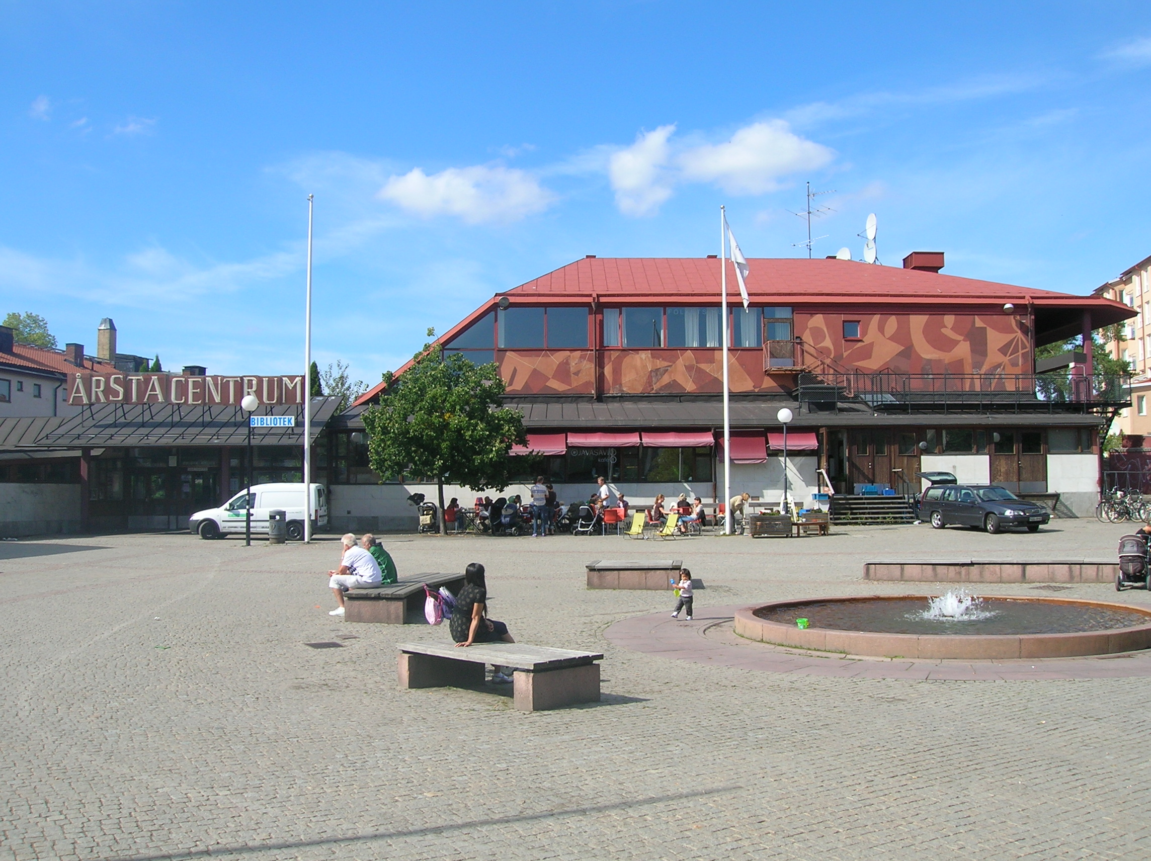 Årsta centrum började planeras 1943, men det dröjde till 1953 innan hela centrumet var klart. I denna byggnad finns bl.a kapprum, entréhall, cafe, teater, ateljéer, bibliotek. På övervåningen finns en föreningslokal och studierum